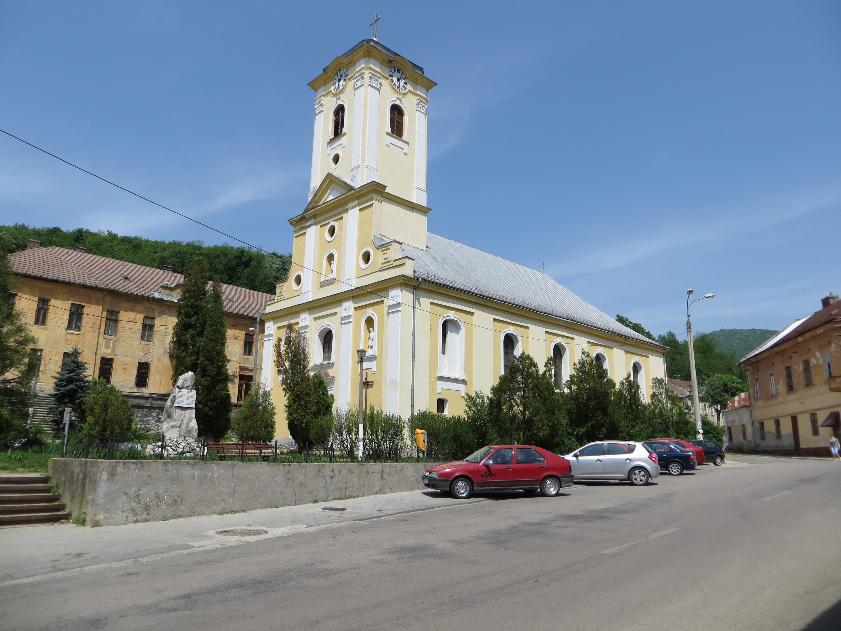 Biserică romano-catolică